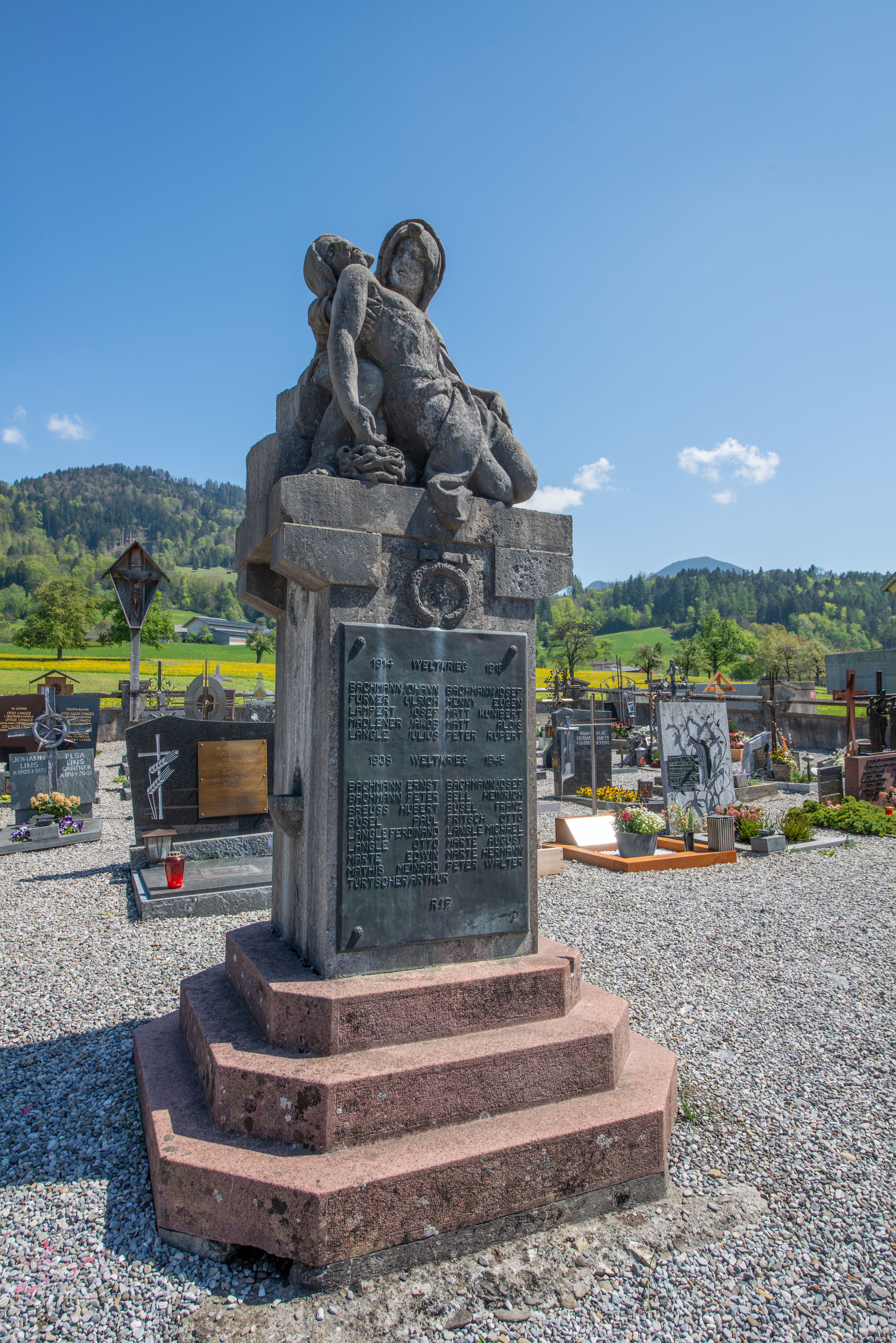 Kriegerdenkmal bez. 1. + 2. Weltkrieg im Friedhof der Pfarrkirche Batschuns in Zwischenwasser,Vorarlberg.